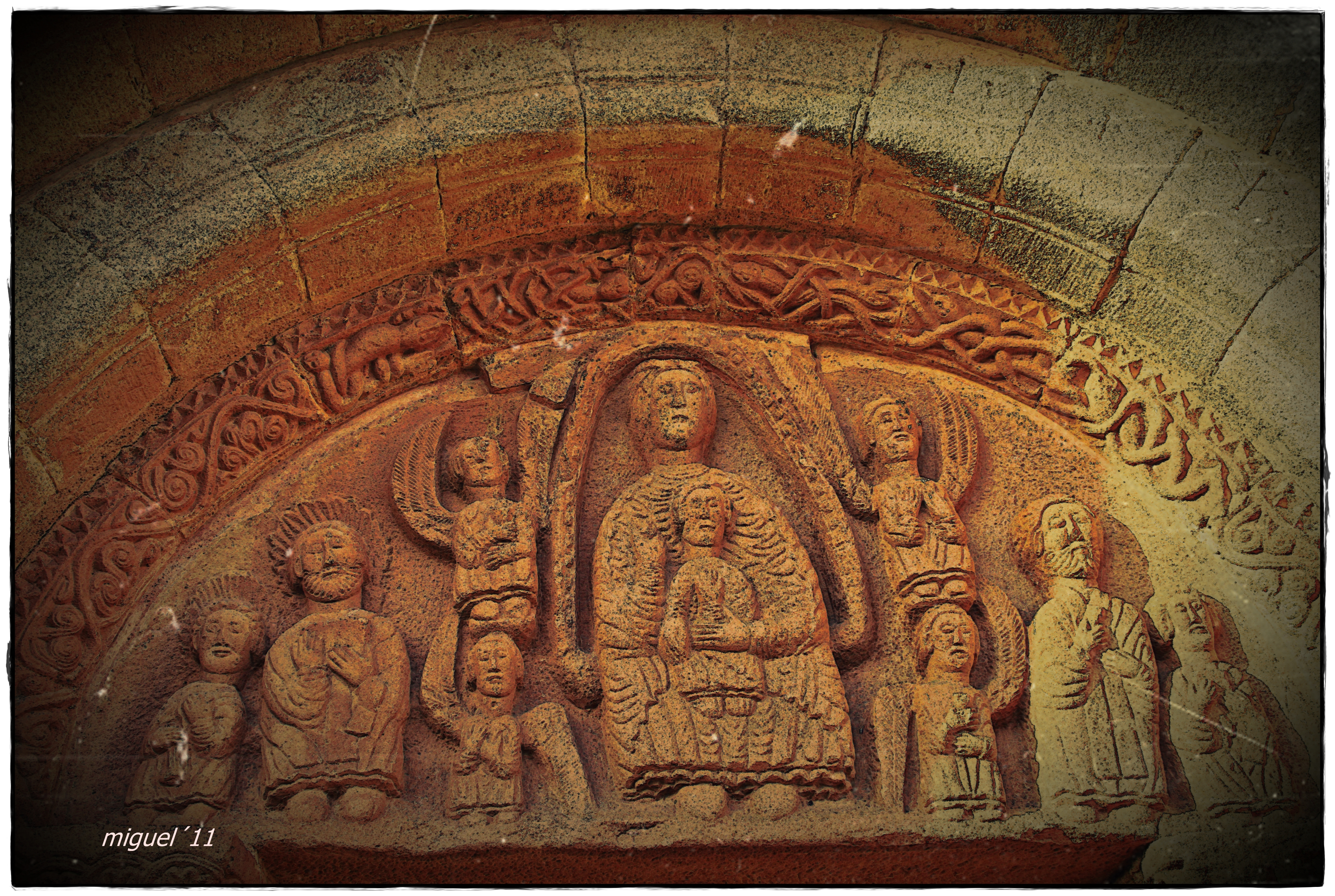 Timpano.